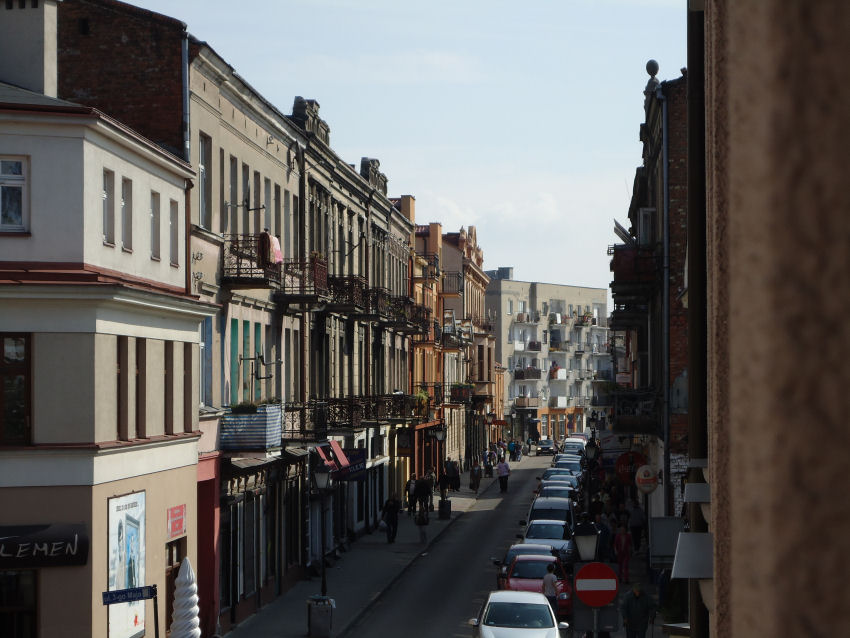 Ulica Piekarska widziana z mieszkania kamienicy.